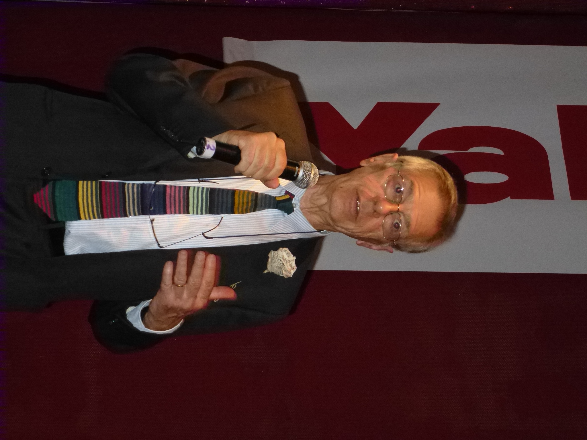 lo scrittore italiano Ernesto Ferrero al Salone del Libro di Torino